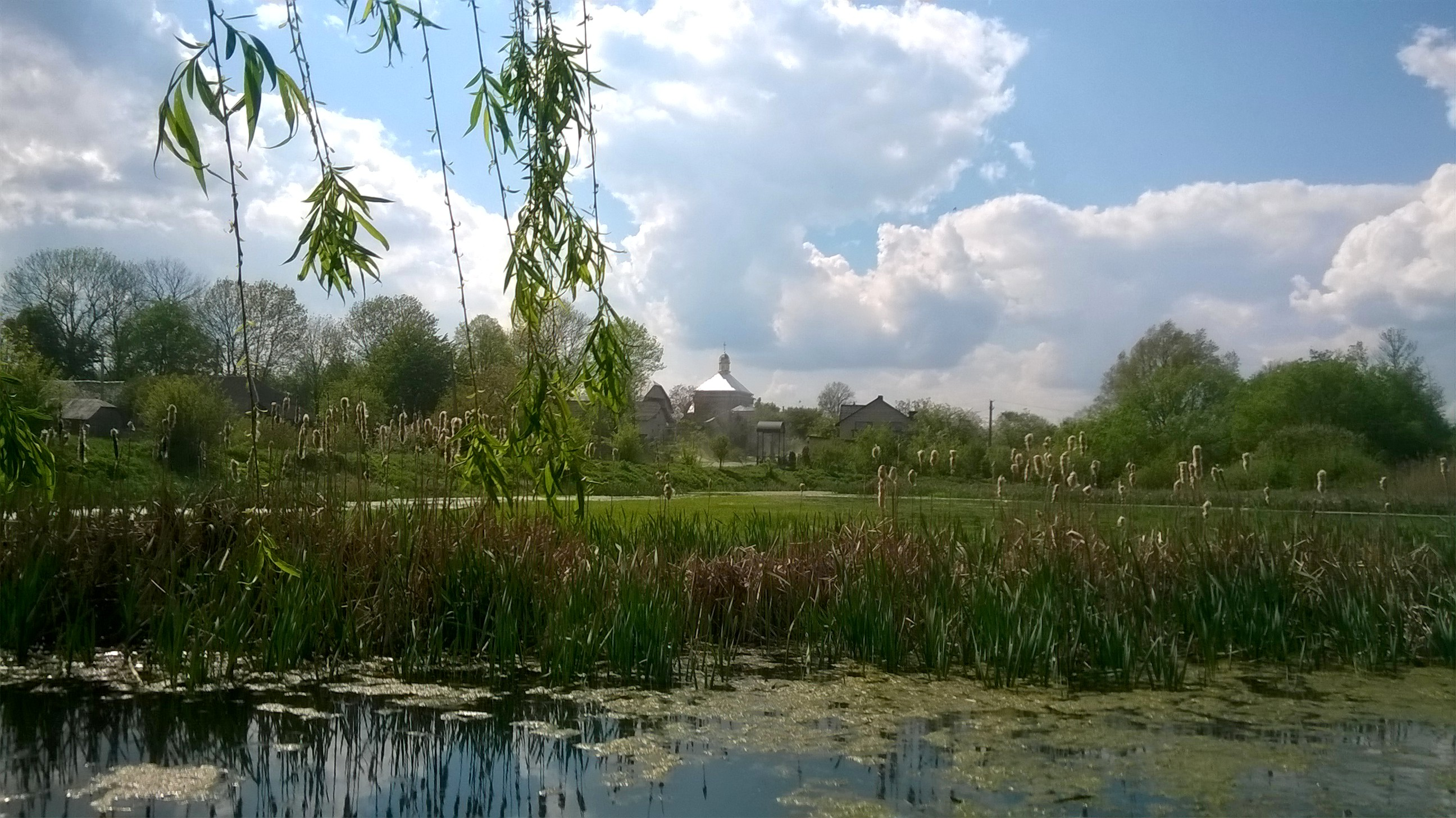 Село Серединки з боку Острова. Вигляд на ставок